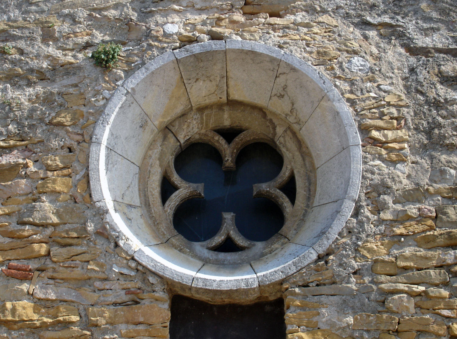 Esglèsia de Sant Joan de Bellcaire (Girona, Catalunya, Espanya)